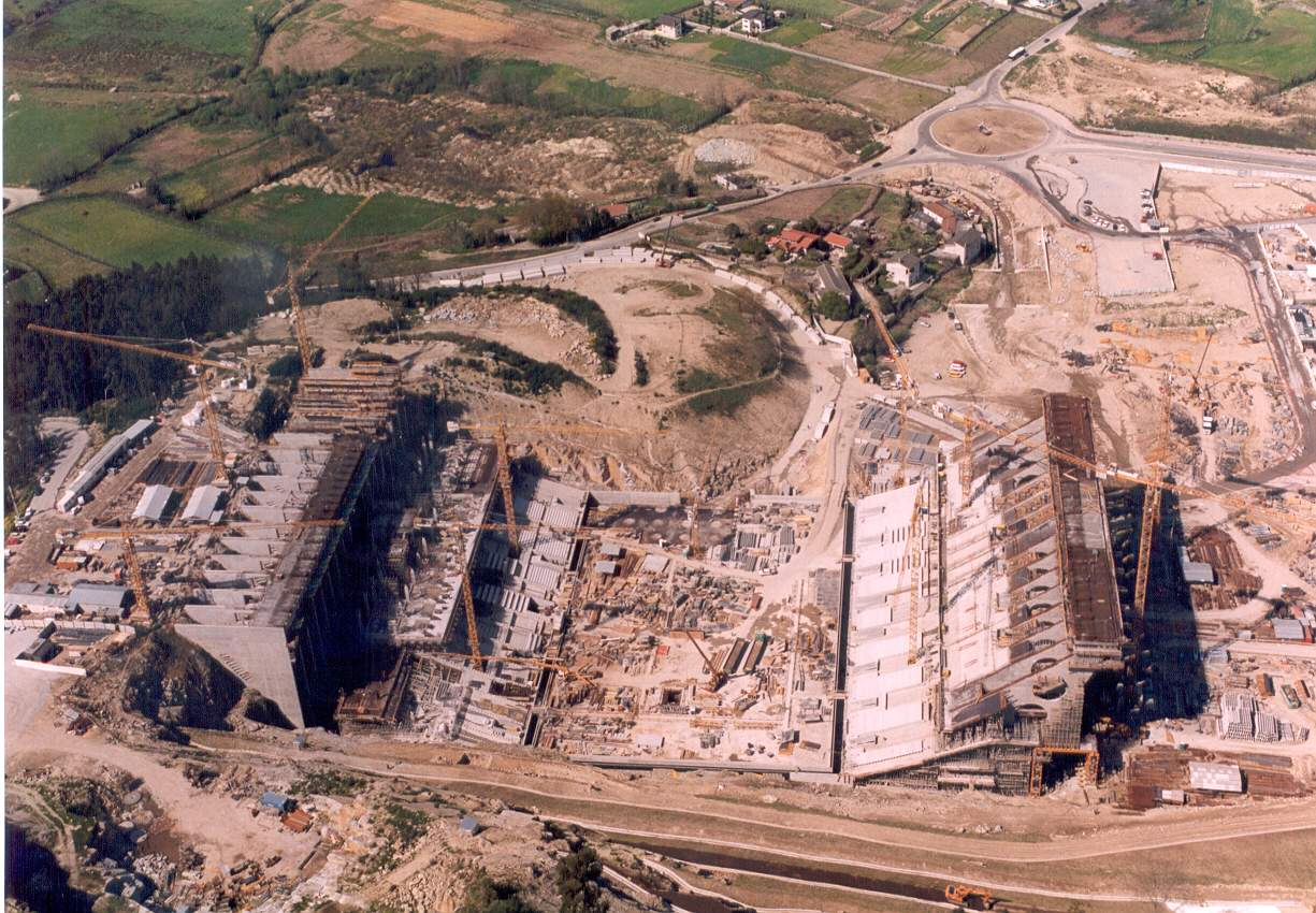 Eduardo Souto de Moura - Braga Stadium Construction 04.jpg